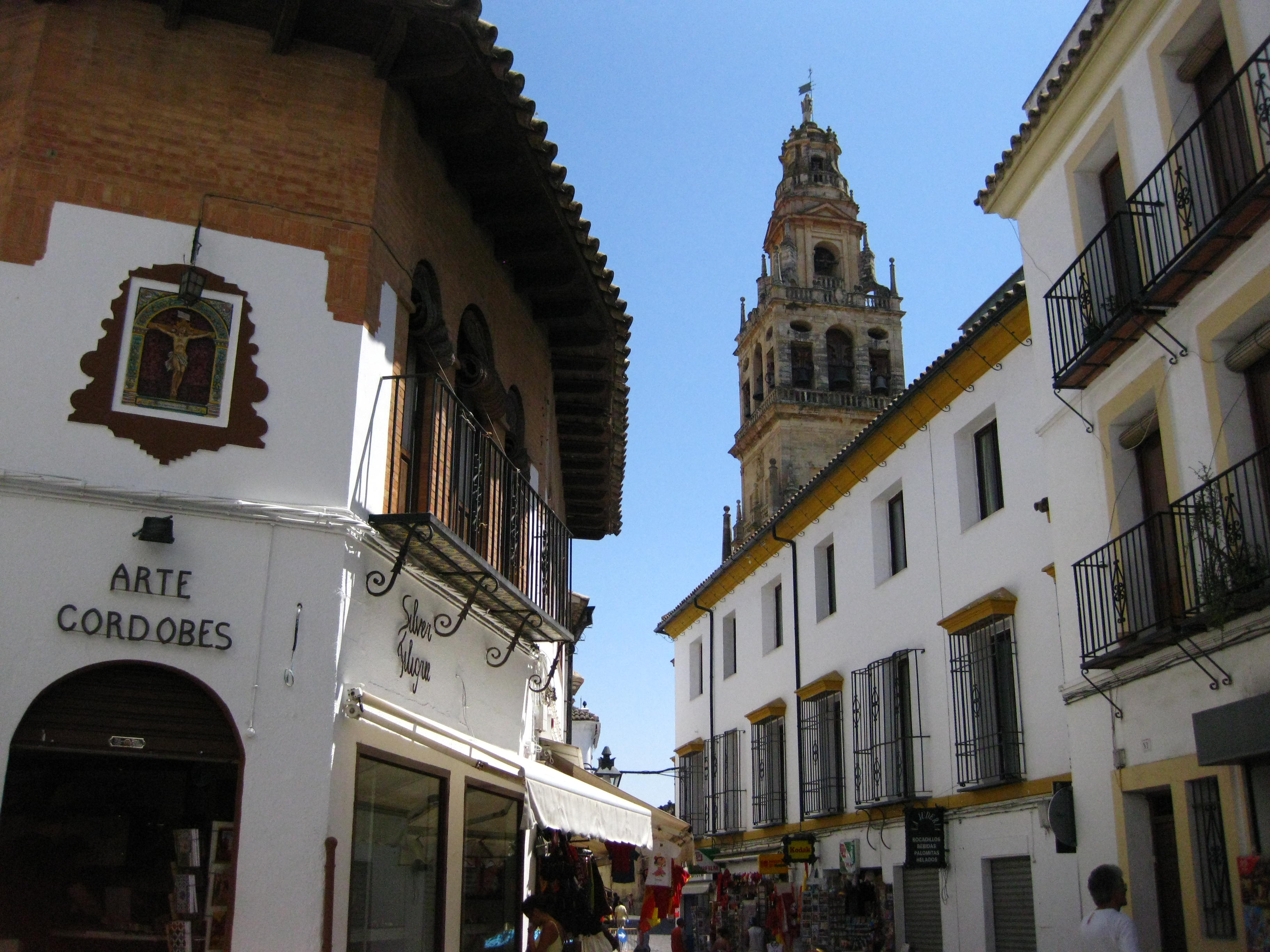 Cordoue, quartier historique